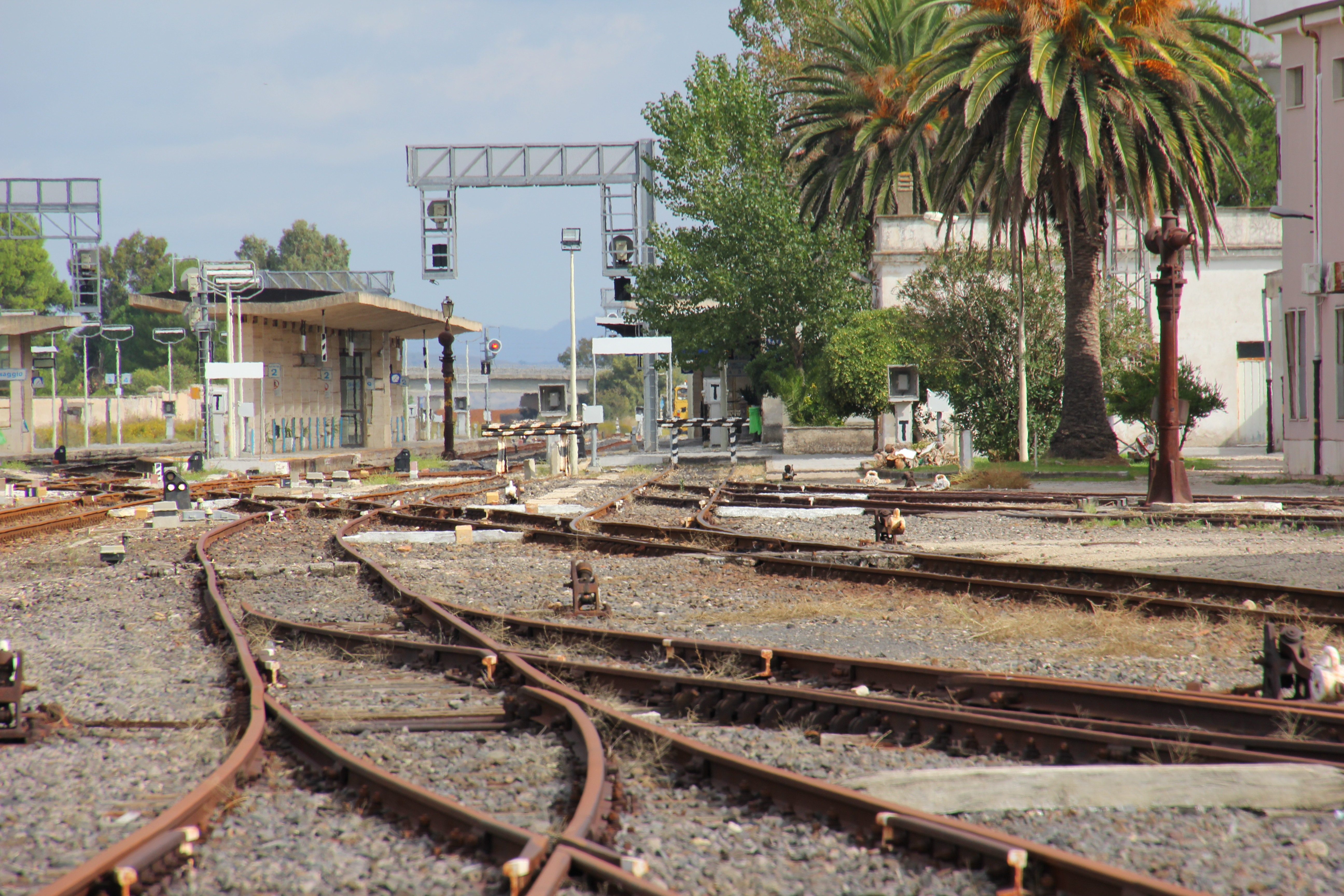 Ozieri - Stazione ferroviaria di Chilivani